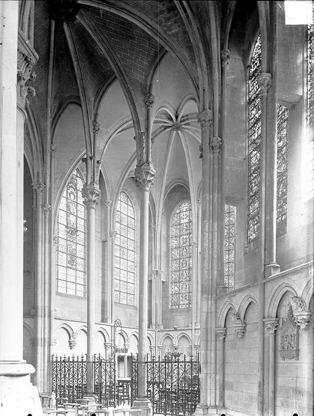 Chapelle absidale.